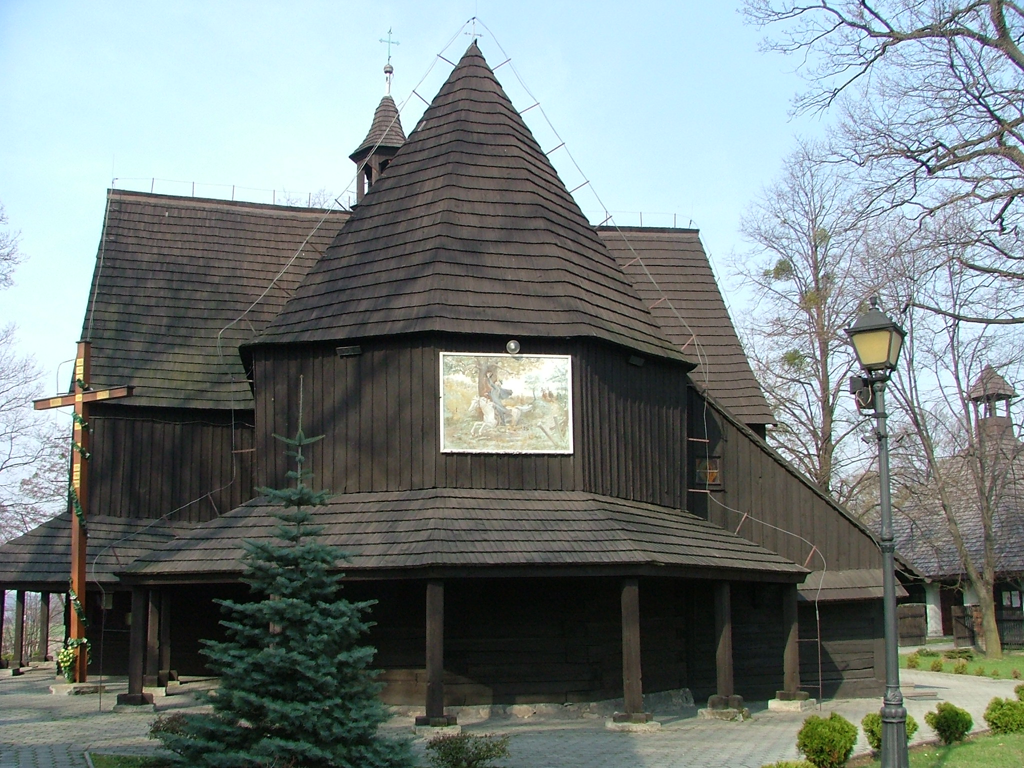 Jankowice (Slask), kościoł wnetrze